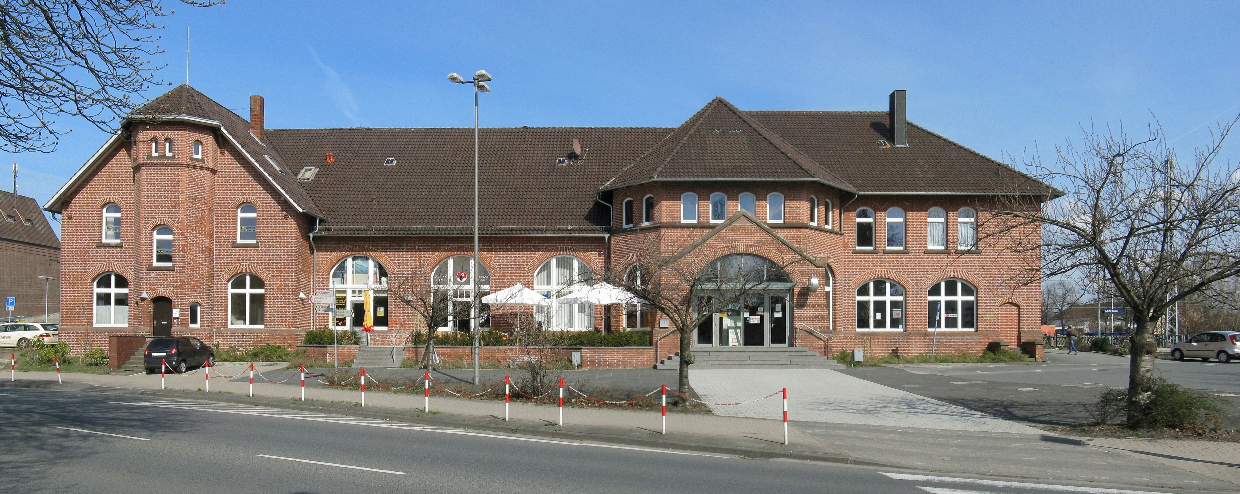 Das Bahnhofsgebäude des Bahnhofs in Lage/Lippe